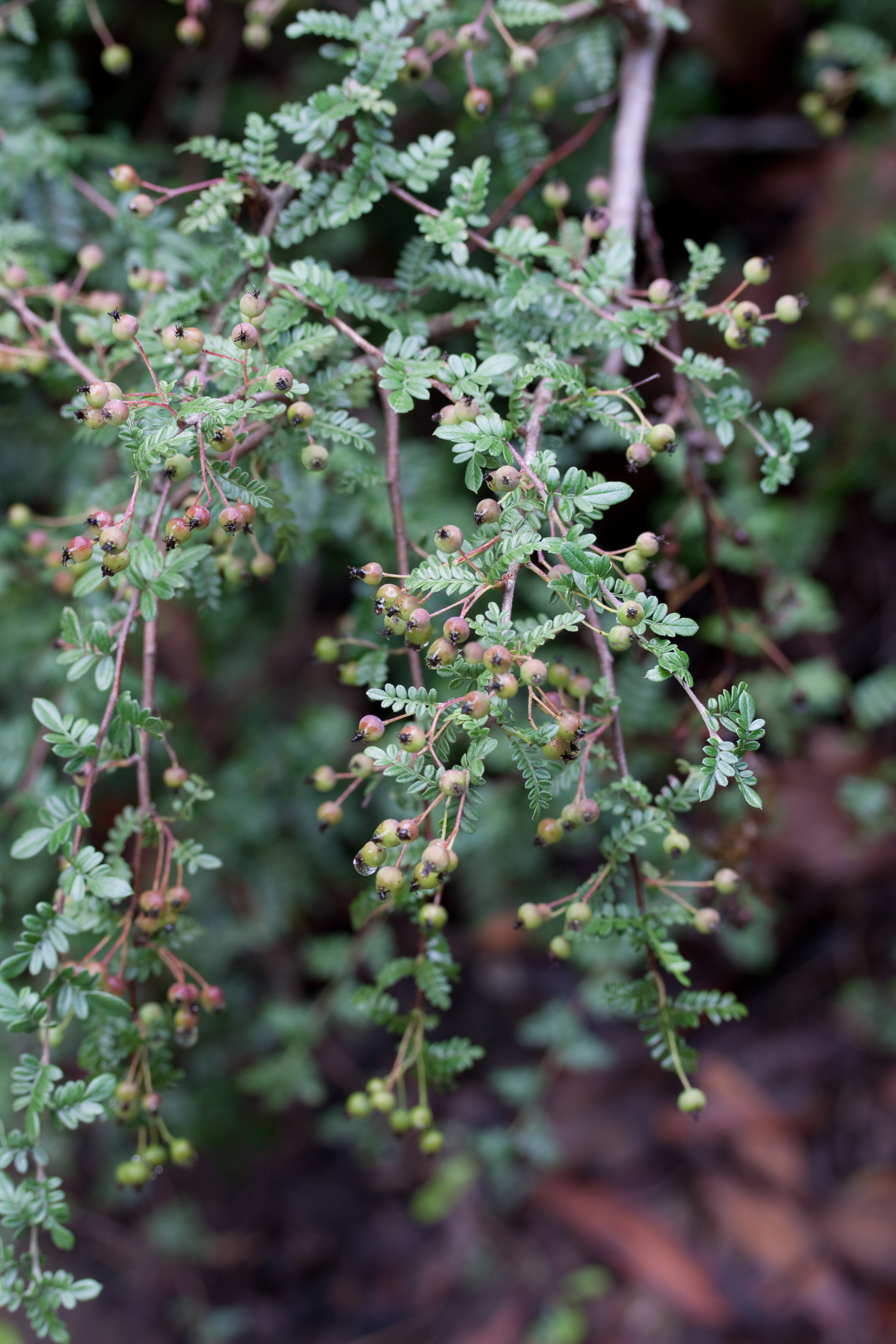 Jeunes fruits d'Osteomeles schwerinae var microphyla - Jardin botanique de Strasbourg - France